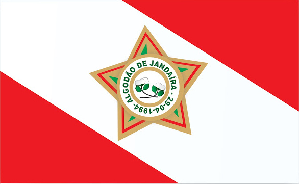 Bandeira do Município de Algodão de Jandaíra no estado da Paraíba, Brasil./ Flag of Paraíba's city Algodão de Jandaíra, Brazil